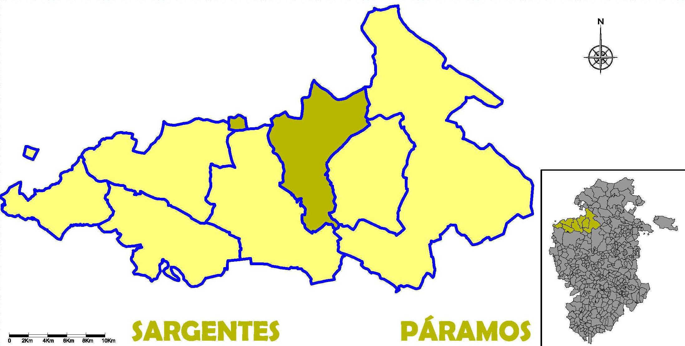 Situación del término de Sargentes de la Lora en la comarca de "Páramos" , provincia de Burgos